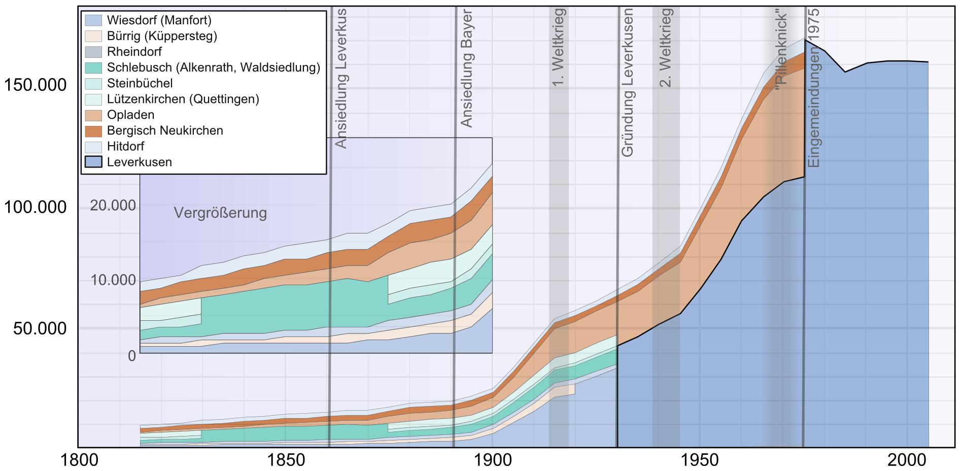 Bevölkerungsentwicklung von Leverkusen und seinen Vorgängergemeinden. Populations development of Leverkusen, Germany, and its predecessors.